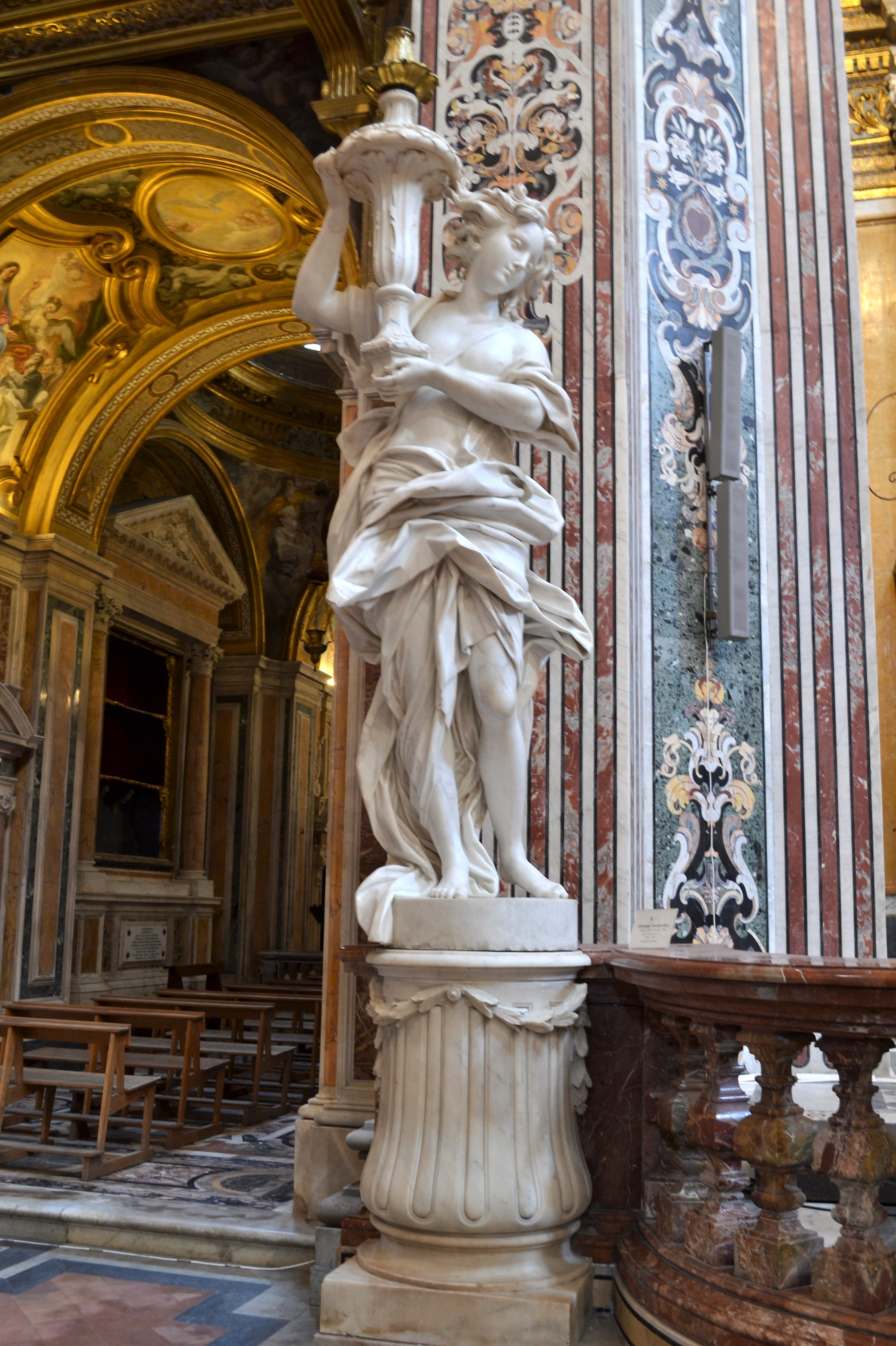 Sull'altare maggiore, angeli reggifiaccola di Giuseppe Sanmartino.